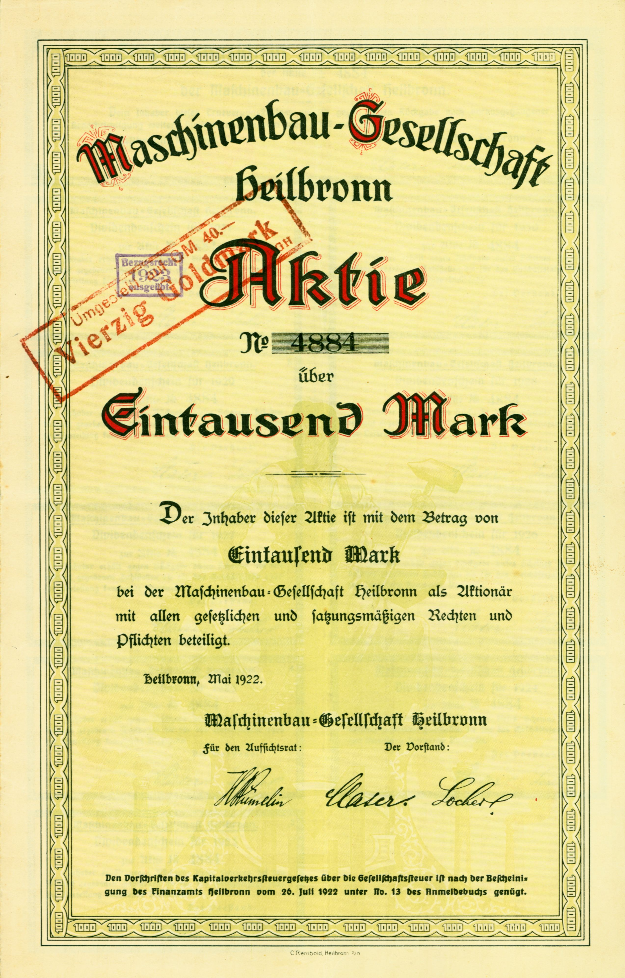 Aktie über 1000 Mark der Maschinenbau-Gesellschaft Heilbronn vom Mai 1922; aus dem Fundus des Ersten Deutschen Historic-Actien-Museum e.V. (EDHAM), Kürnbach